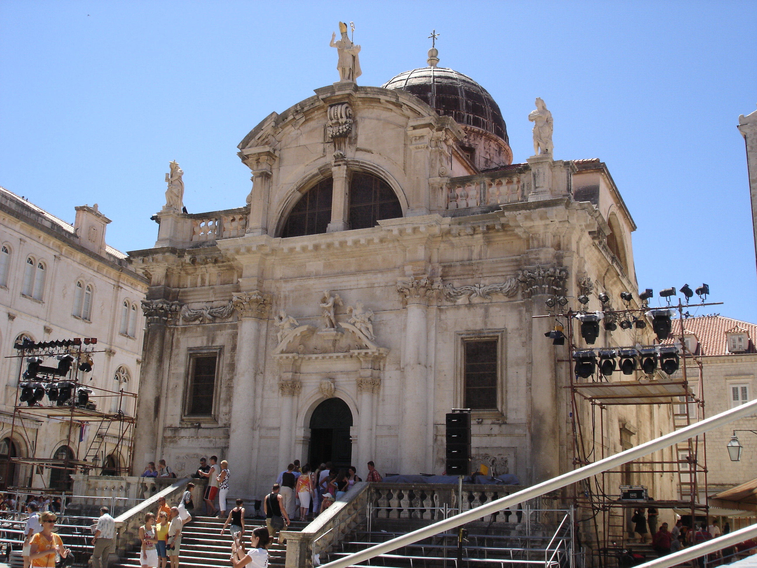 Dubrovnik; Ragusa